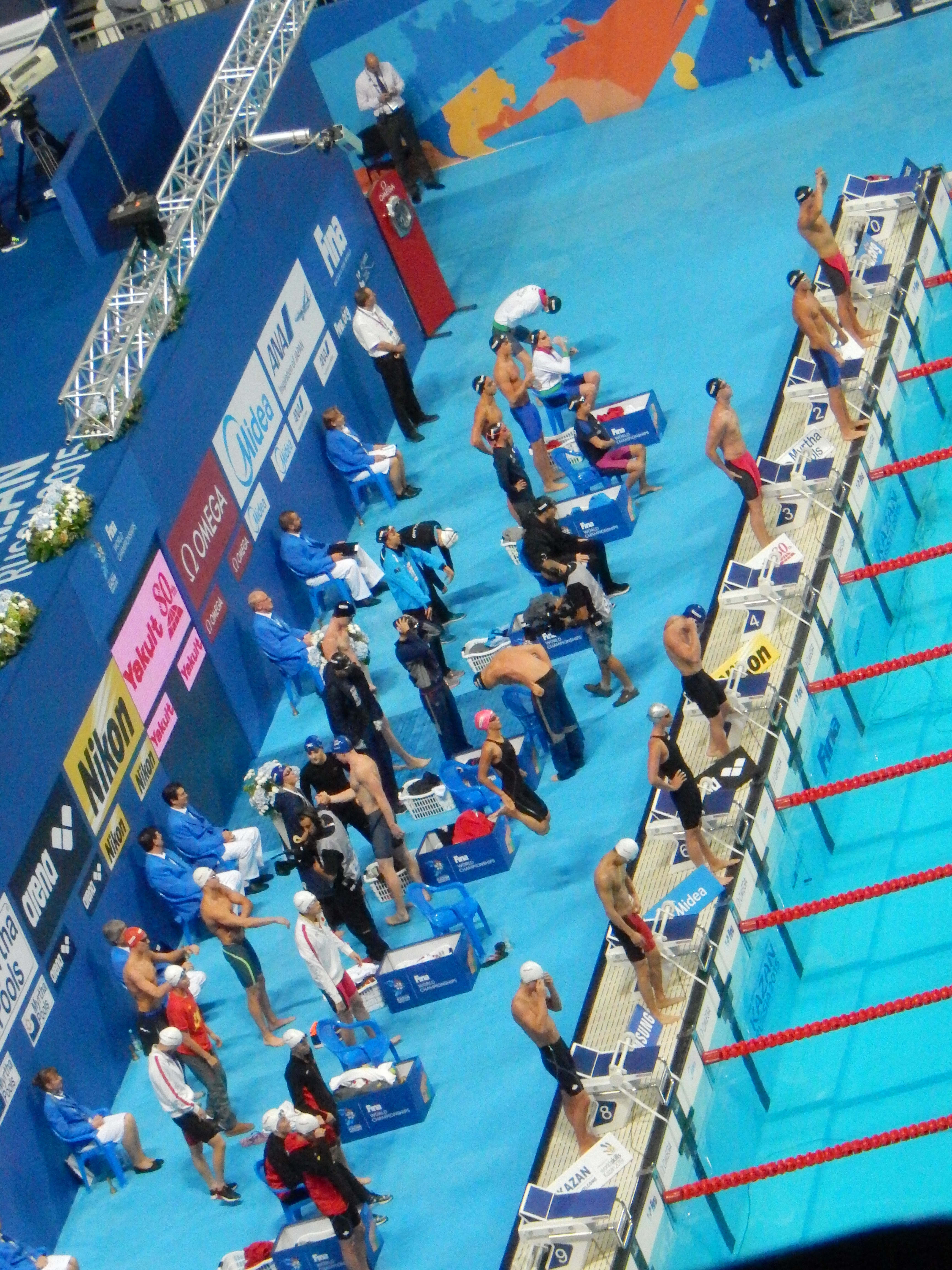 Старт смешанной комбинированной эстафеты